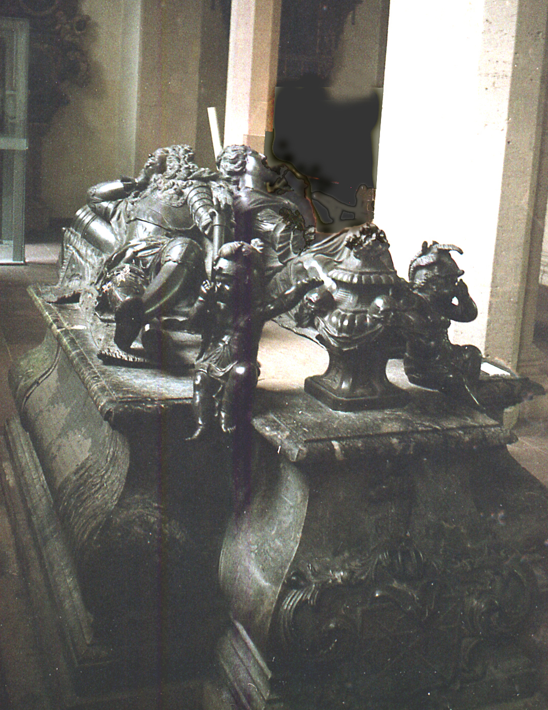 Могила деда Петра Второго.